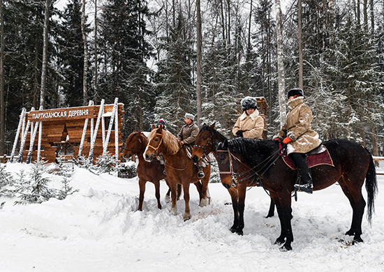 Историко-мемориальный комплекс «Партизанская деревня» на территории Военно-патриотического парка культуры и отдыха Вооруженных Сил РФ «Патриот»